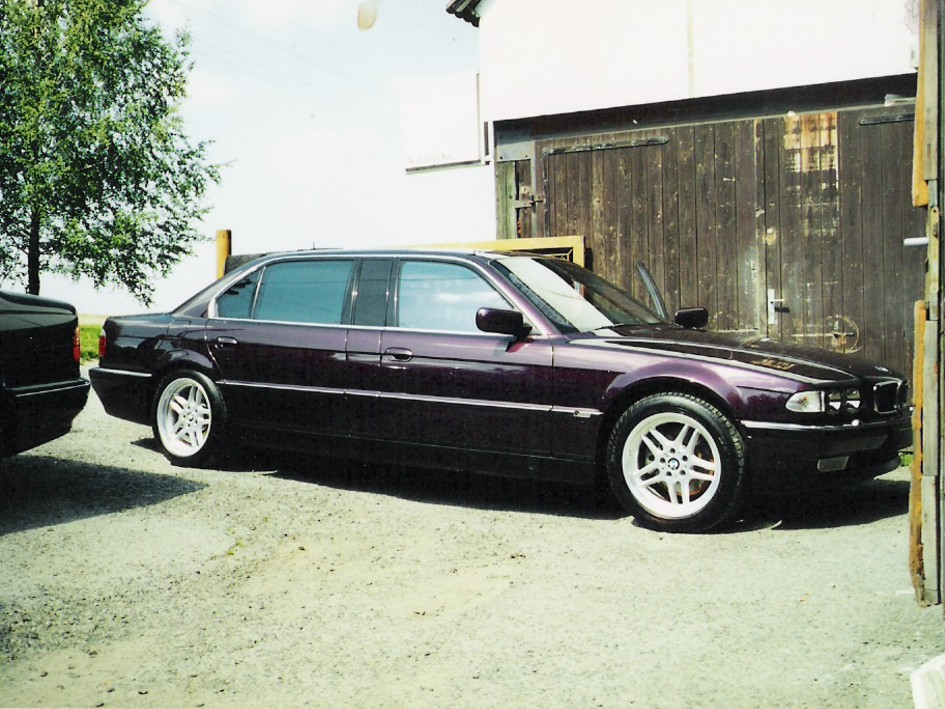 750iLA L7 in mora aus 2000 Seitenansicht links